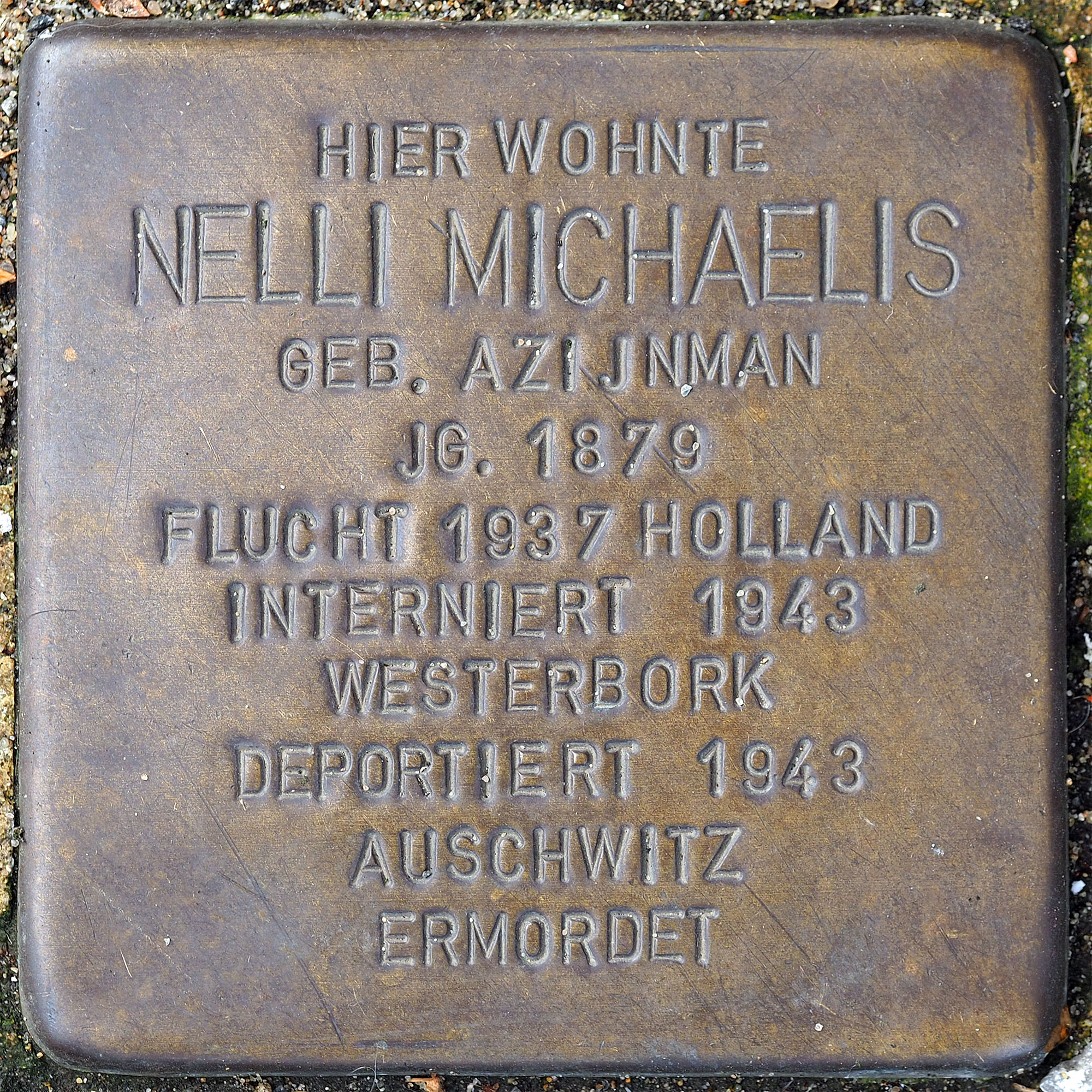 Stolpersteine MG: Michaelis, Nelli